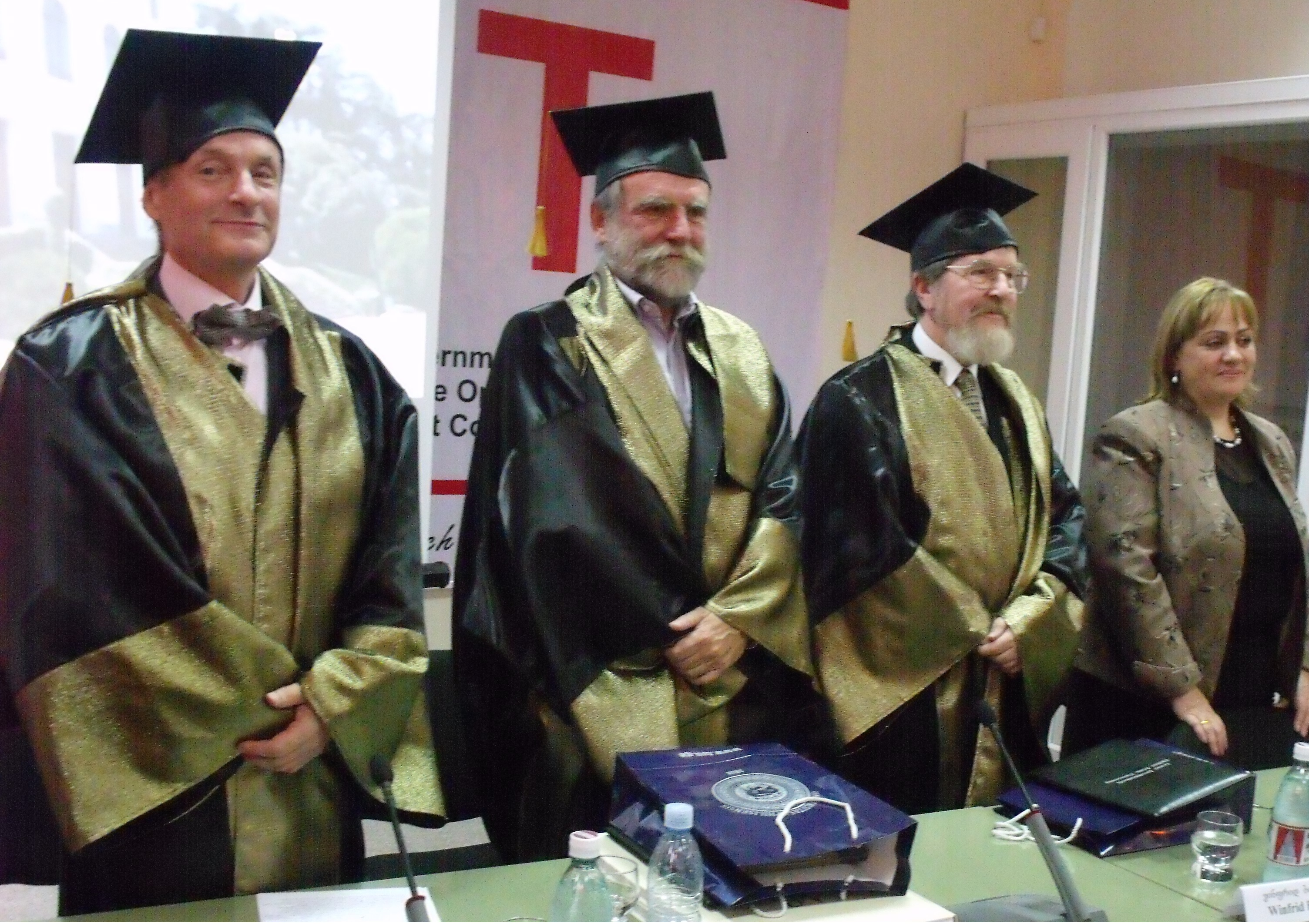 (nicht Deutsch, sondern Persisch) بیرنارد ئاوتییر, یۆست گیپێرت, ویندفرید بویدیر